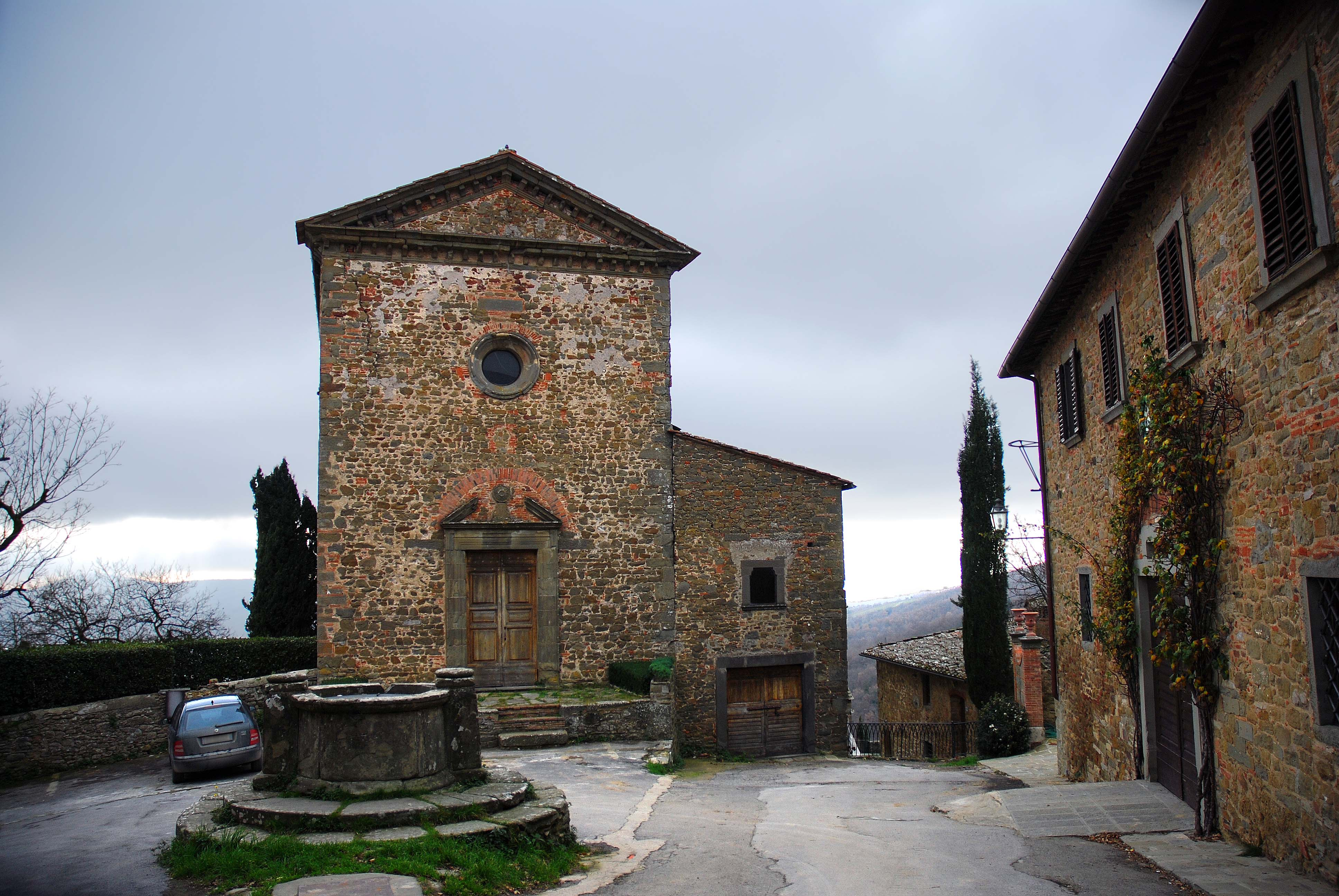 Commenda di Sant'Eufrosino a Volpaia - Radda in Chianti - Siena